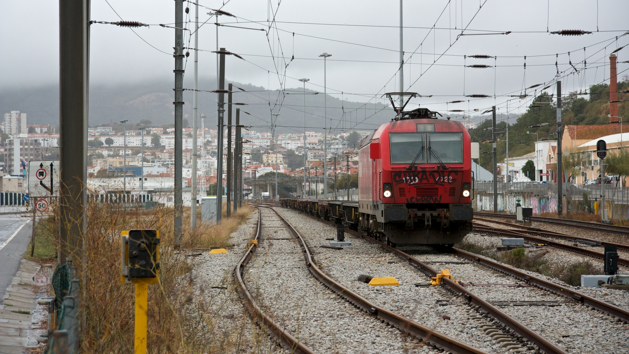 Tipo: Comboio de Transporte de Cimento 91209 (material vazio) [Setúbal • Mar - Alhandra] Local: Estação de Setúbal • Mar [Linha do Sul, PK 29] Data e hora: 17 de Outubro de 2012 [16h00] Material: Locomotiva 4723 + xx vagões CP Rlps e outros